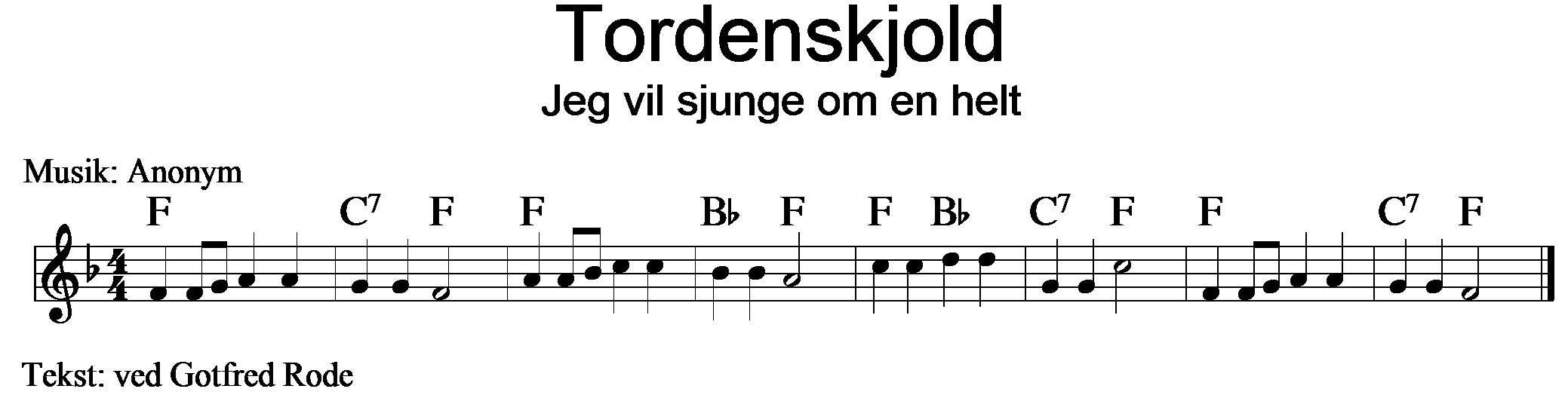 Tordenskjold. (folkevise).